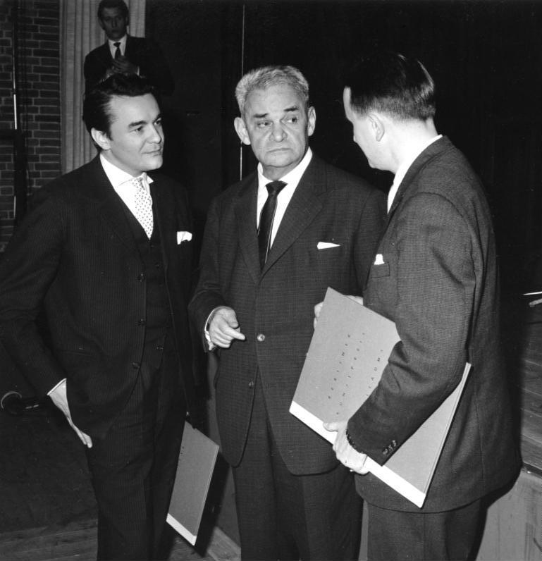 Berlin/West In einer Feierstunde, am Sonntag, den 21.4.1963, in der Akademie der Künste, verleiht der Senator für Wissenschaft und Kunst, Dr. Adolf Arndt den diejährigen Berliner Kunstpreis. "Jubiläumsstiftung 1848/1948 und den Preis "Junge Generation" für 1963. v.l.n.r.: Klaus Kammer, Fritz Kortner, Rolf Hochhuth